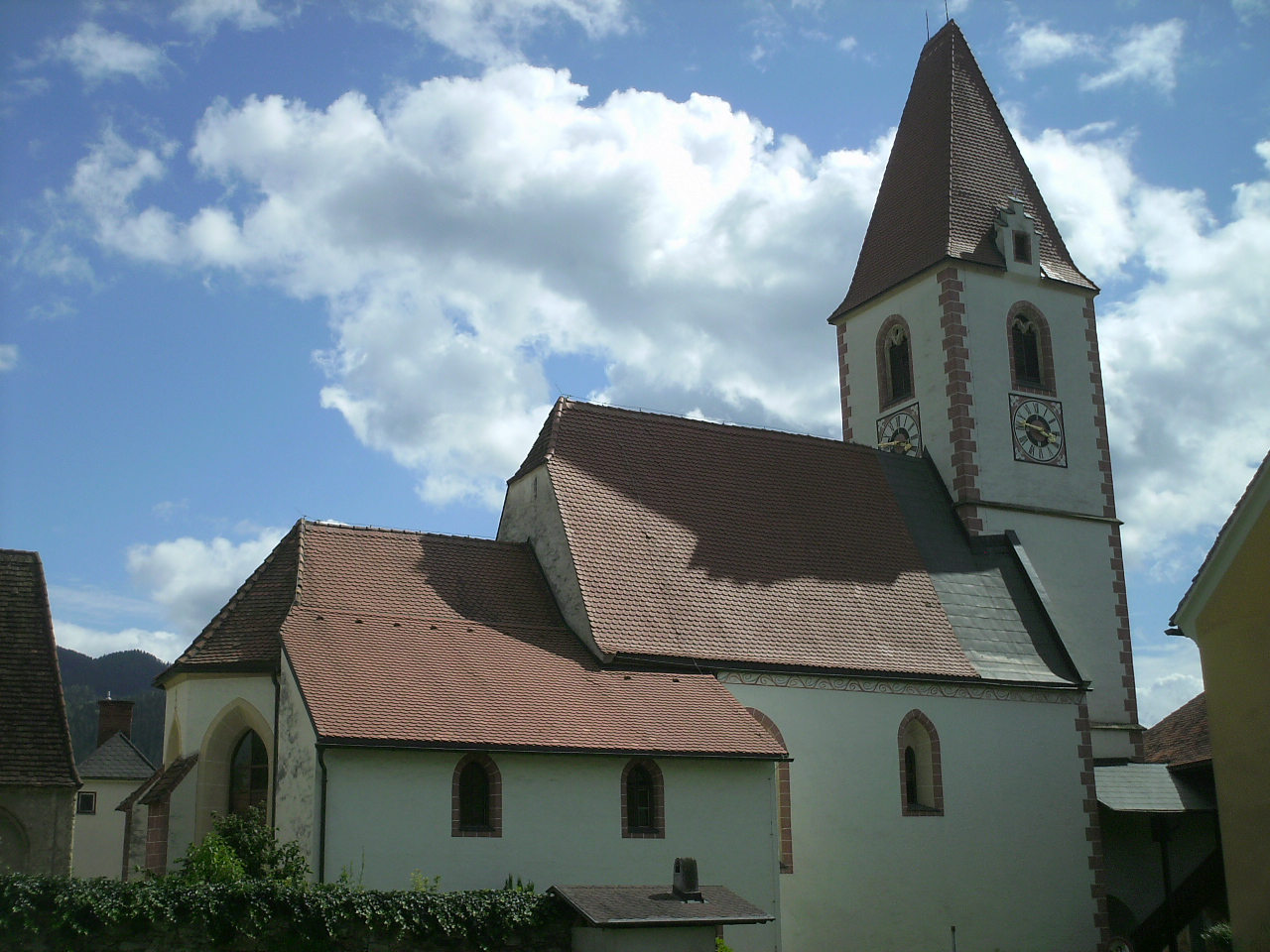 Kath. Pfarrkirche der hl. Anna und Kirchhof in St.Marein/M.